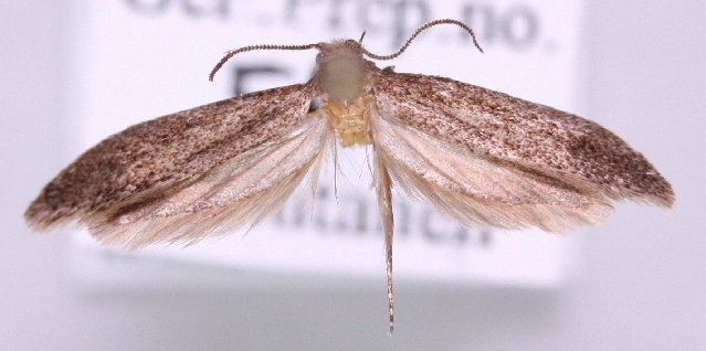 Elatobia fuliginosella